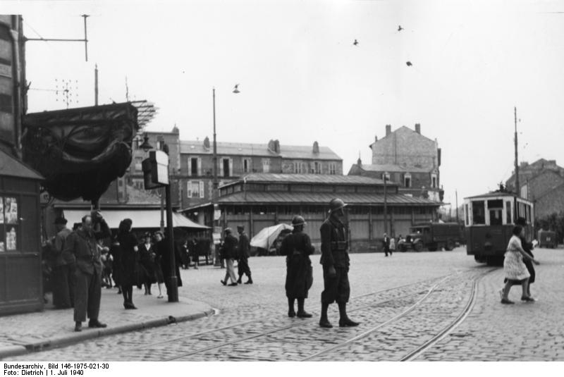 Prop.-Kp. 612 Ort: Limoges, Datum: 1.7.40 Jenseits der Demarkationslinie regeln franz. Soldaten den Verkehr.